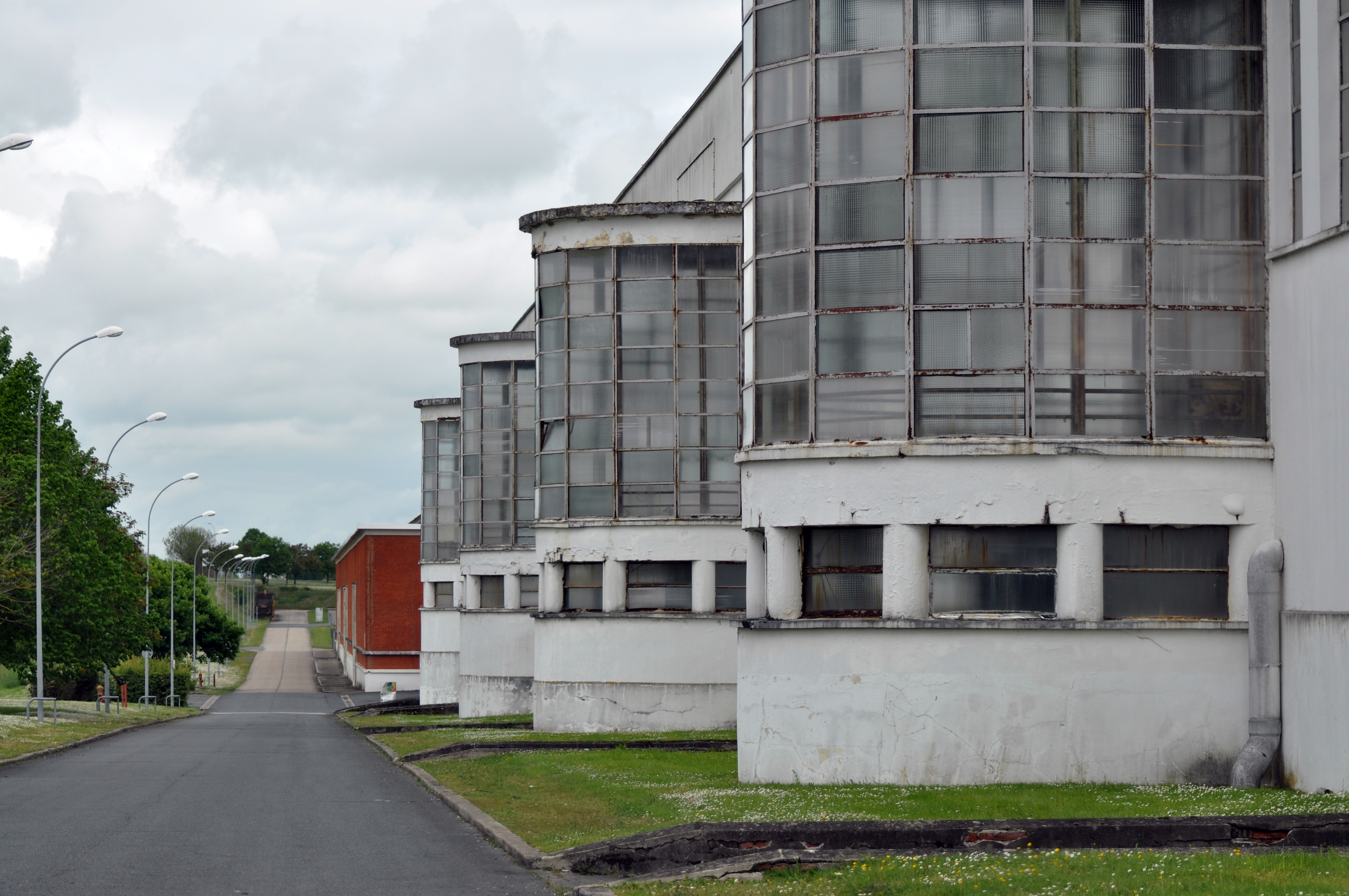 Ancienne usine Marcel BLOCH, 1936.